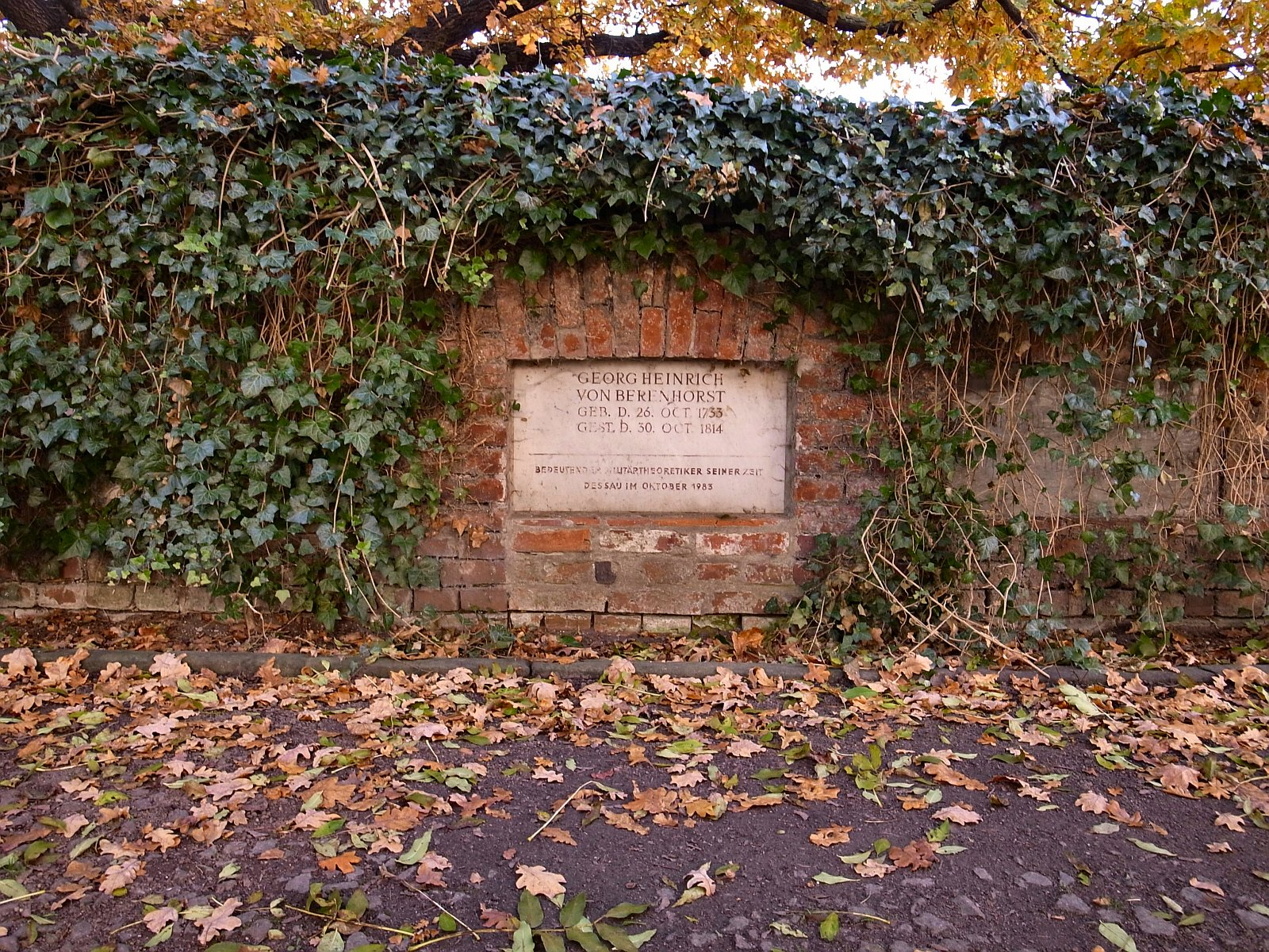 Georg Heinrich von Berenhorst, Neuer Begräbnisplatz (Dessau)